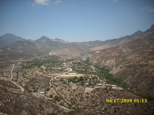 Poblado de San Miguel Jigui